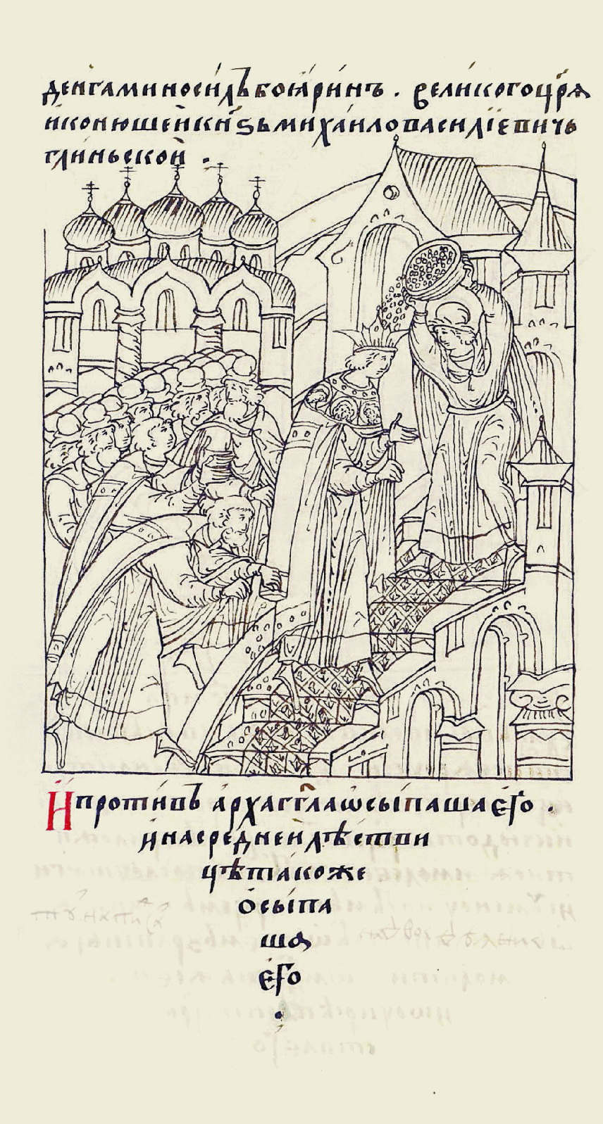 Coronationscene Ivan IV. / Krönungsszene von Iwan IV. деньгами нес боярин великого царя и ко- нюший князь Михаил Васильевич Глинский; и напротив Архангель- ского собора осыпал его, и на средней лестнице также его осыпал.